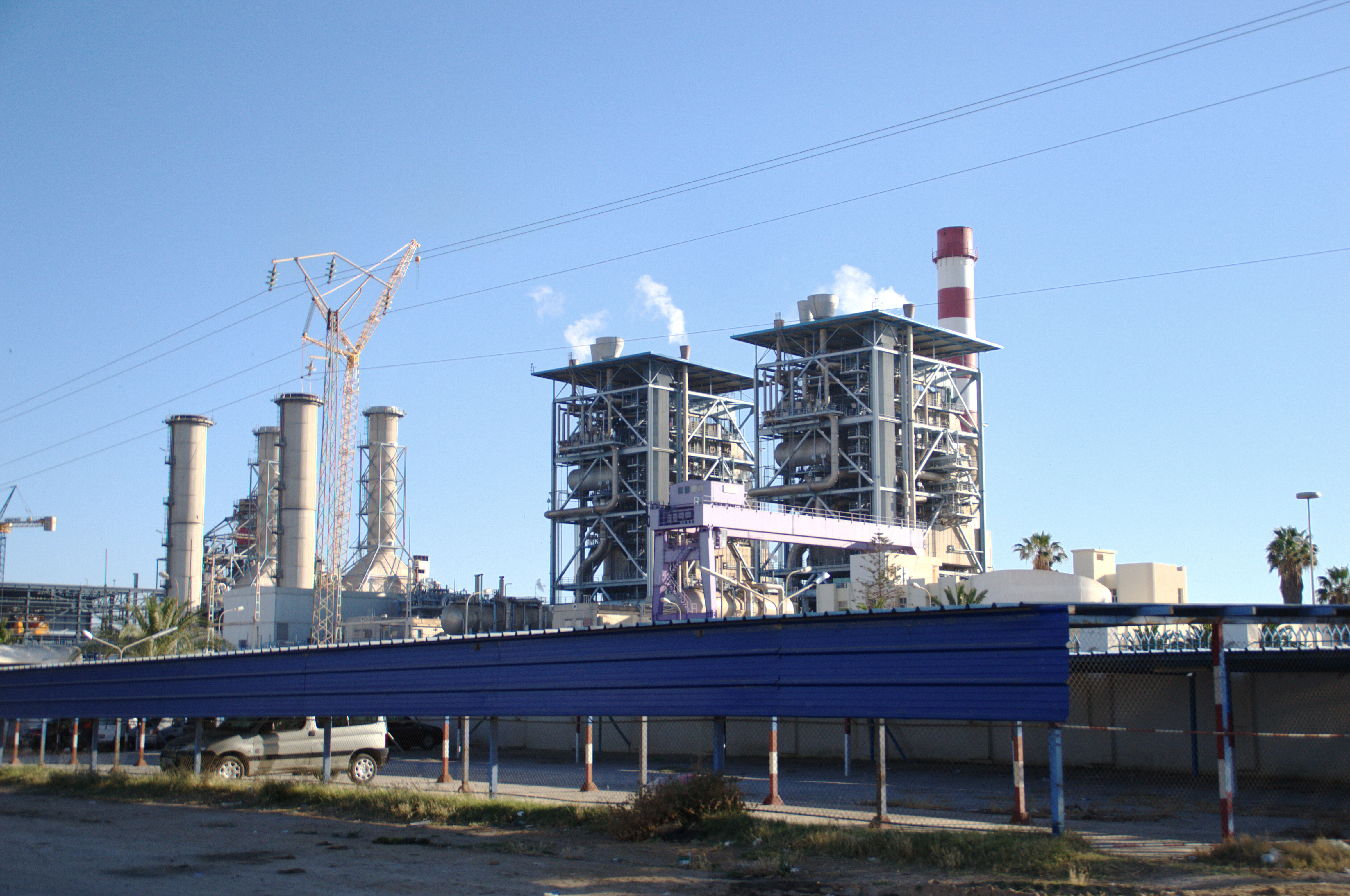 Centrale thermique de la Steg à Sidi Abdel Hmid - Sousse Tunisie